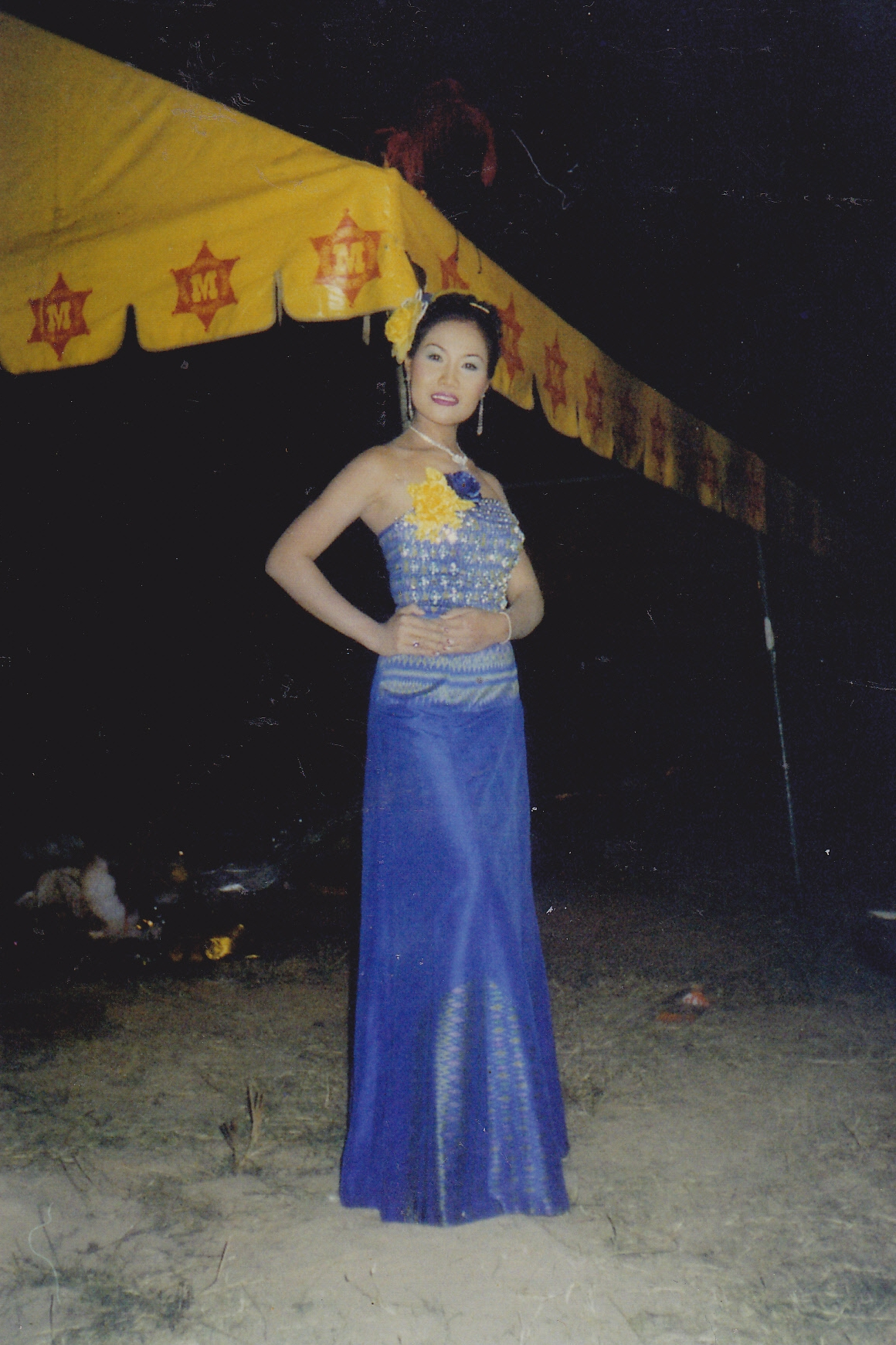 แสงอรุณ บุญยู้